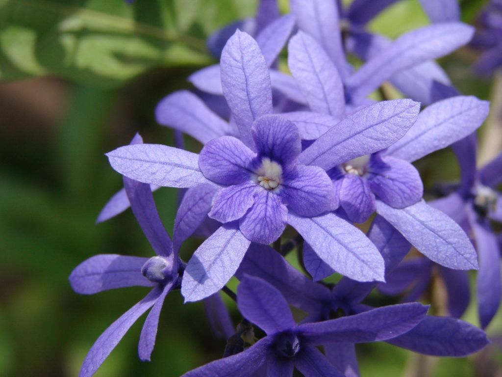 Petrea volubilis L. tem como sin. het. Petrea subserrata Cham. - VERBENACEAE - Jardim Botânico de Brasília - Distrito Federal - Brasil.